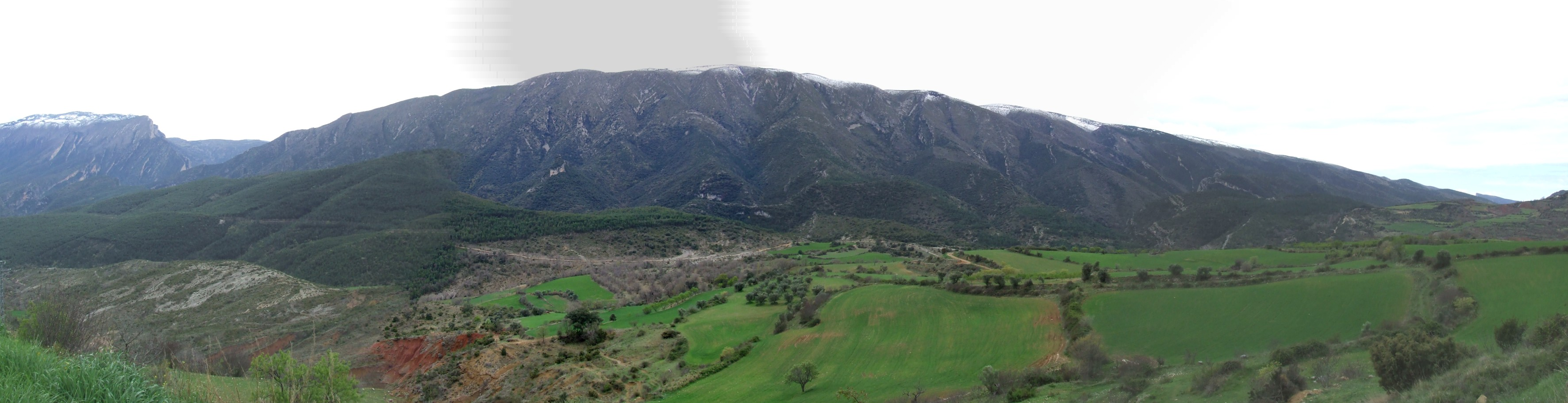 El Montsec d'Ares des del terme de Sant Esteve de la Sarga, prop de Moror (Pallars Jussà)